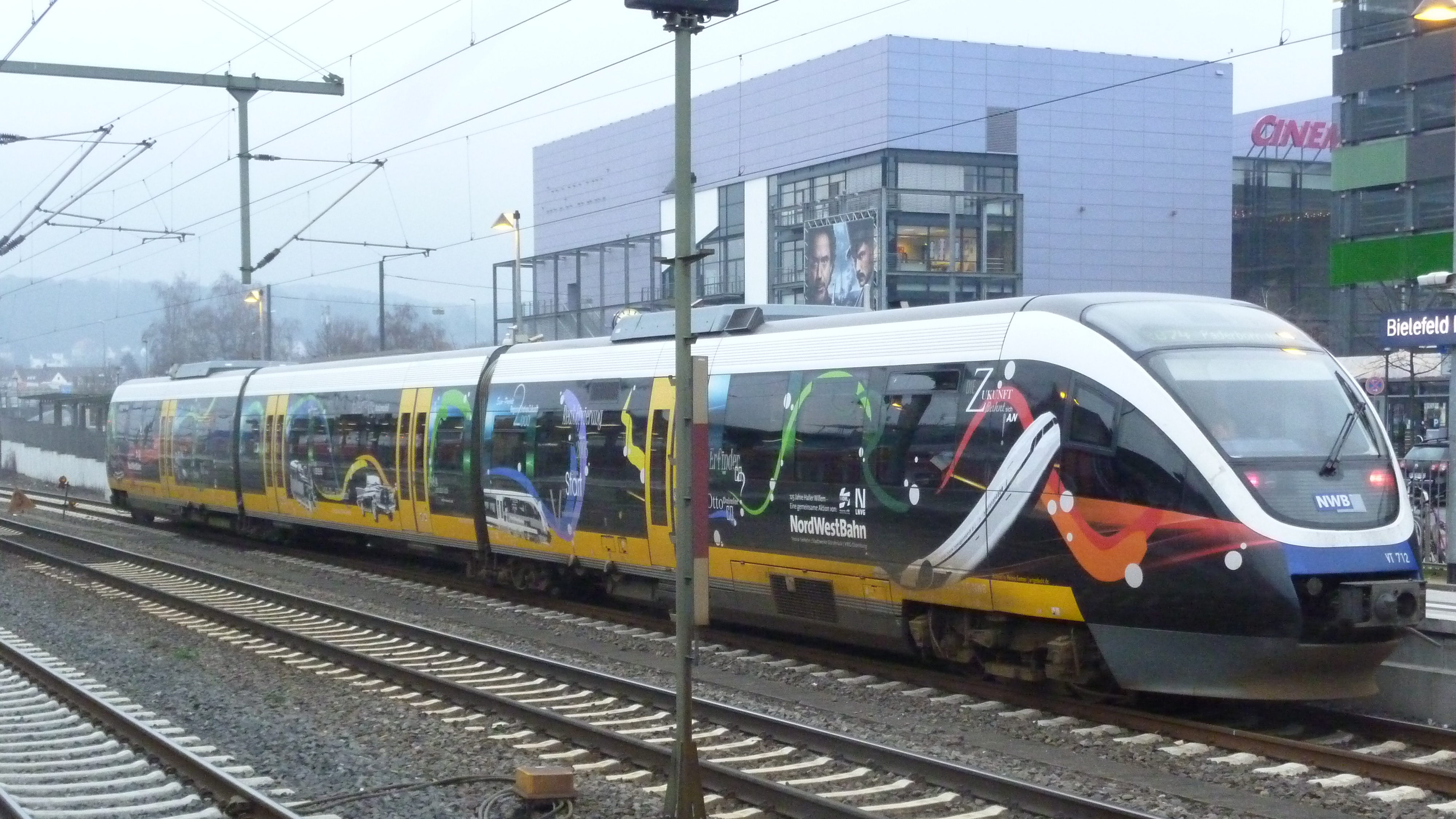 NWB VT712 in Sonderlackierung "Haller Willem" in Bielefeld Hbf.